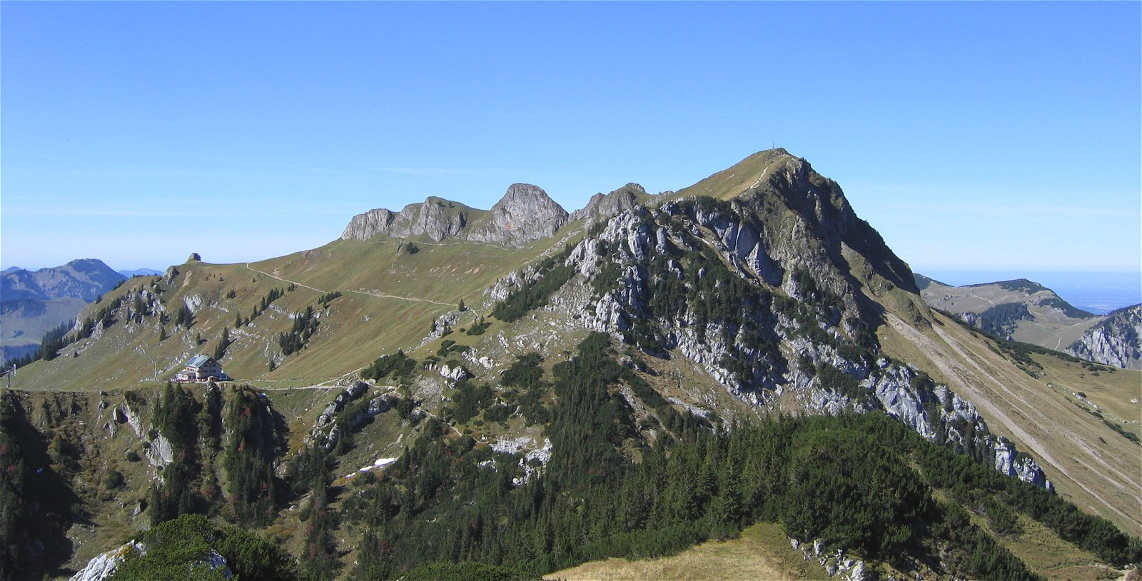 Rotwand vom Auerspitz gesehen